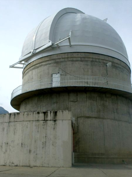 Instalaciones del Observatorio Astronómico Nacional de Llano del Hato, Merida - Venezuela